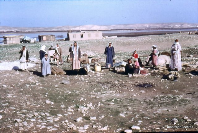 Syrien 1961 - Der Umzug in der Wüste